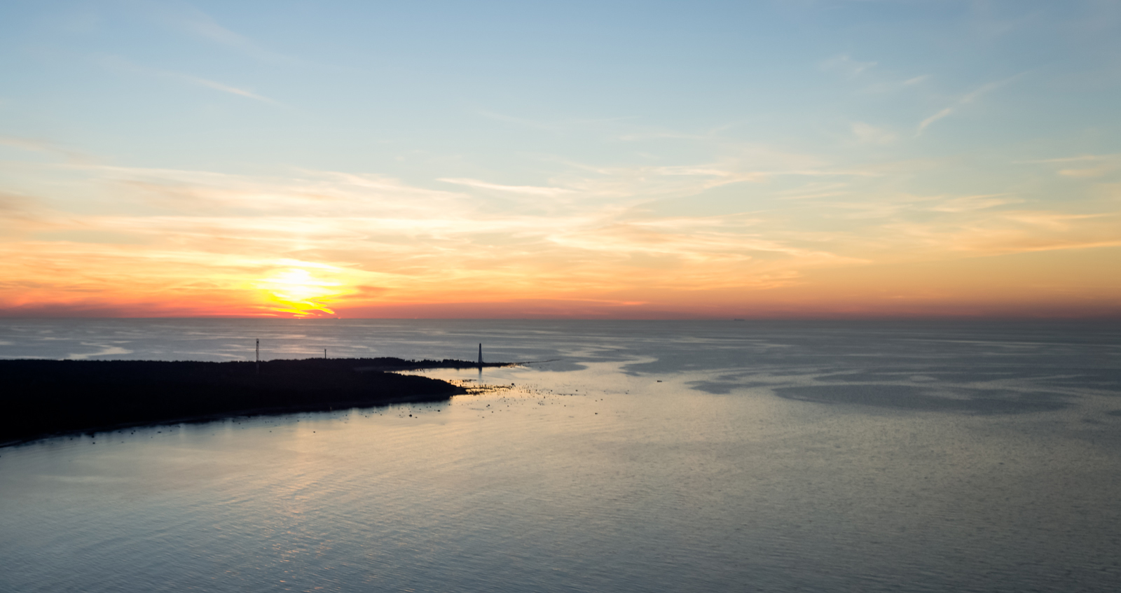 Tahkuna poolsaar